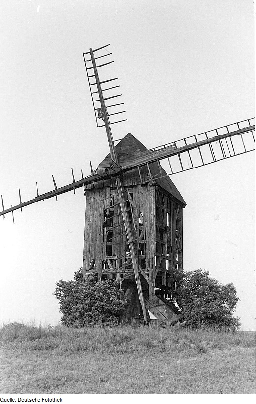 Original image description from the Deutsche Fotothek Michendorf-Langerwisch. Bockmühle, Baujahr 1709 (2002 eingestürzt)